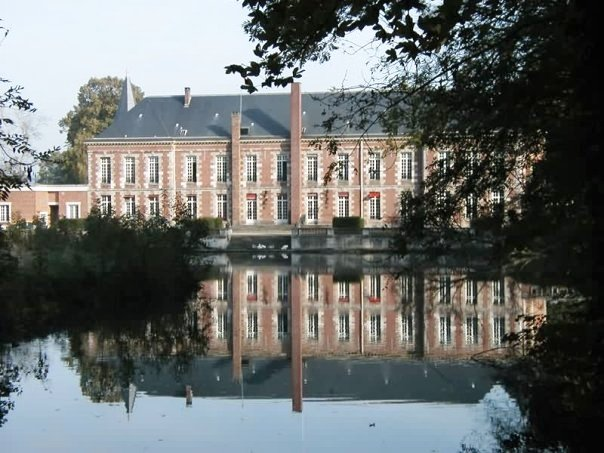 Façade du Château du Jard à Voisenon (77)